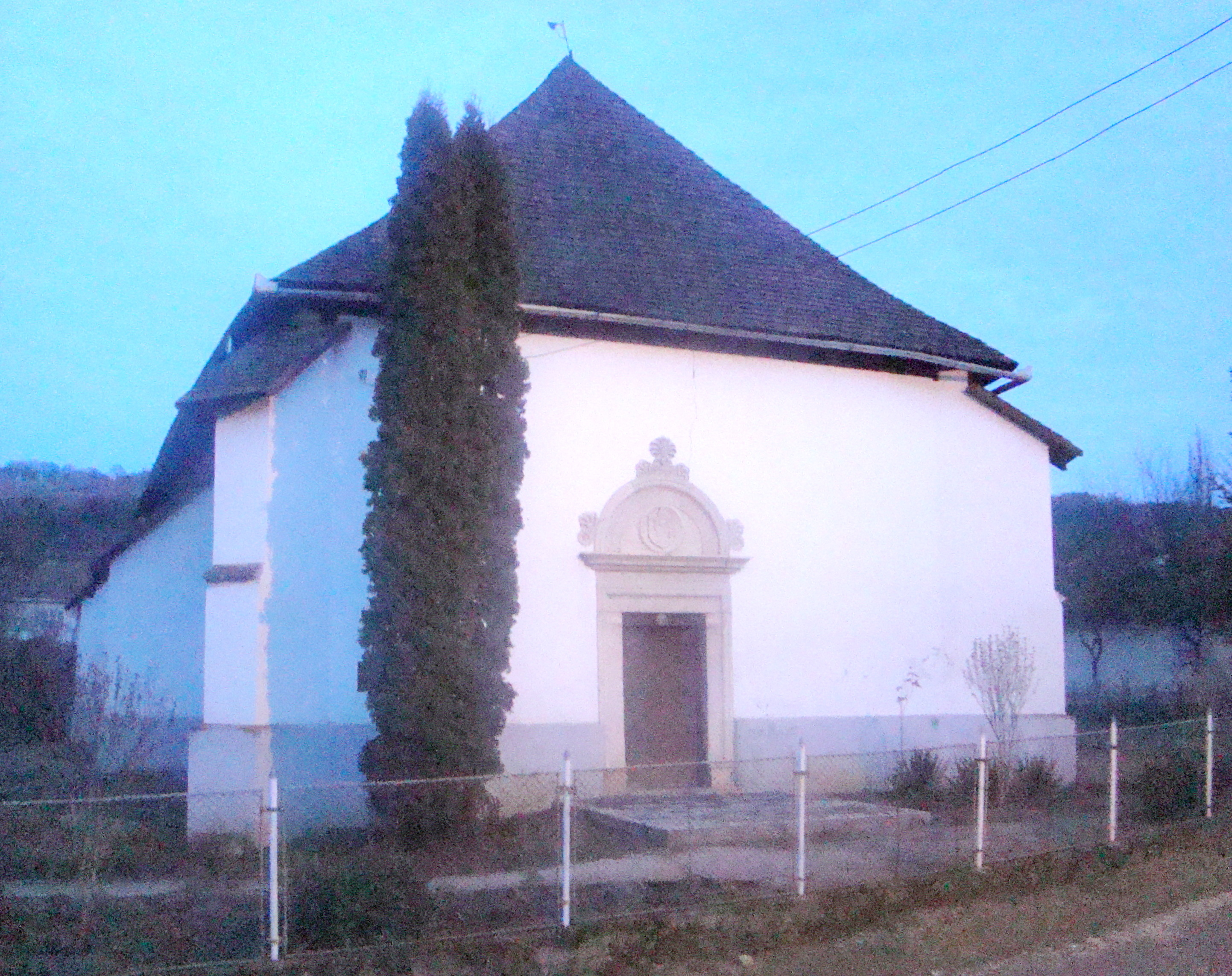 Biserica reformat-calvină din Mineu 01